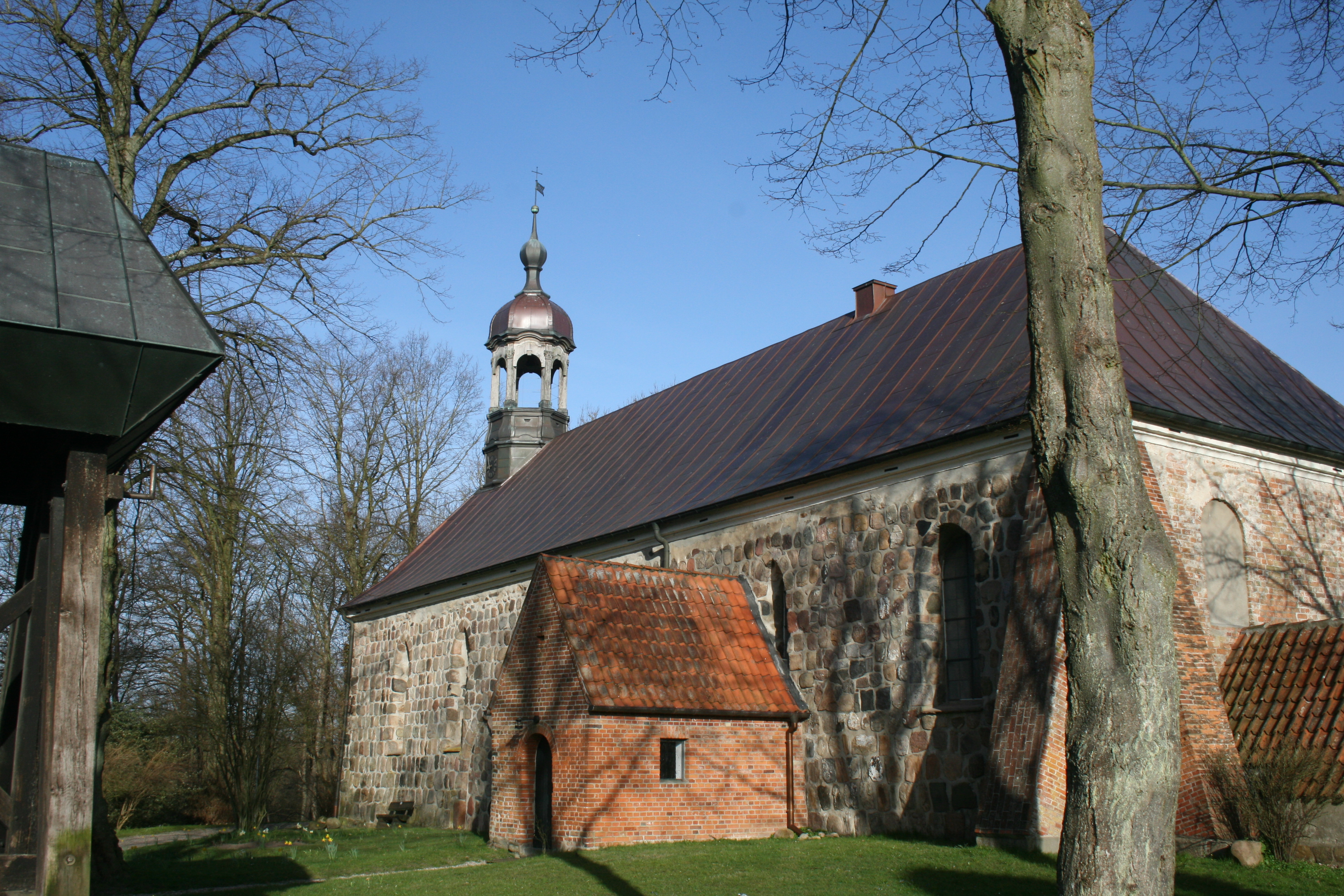 Kirche St. Georg & Mauritius in Quarnbek, Ortsteil Flemhude, Lindenkamp 1 (Denkmalnummer Quarnbek Flemhude 2)